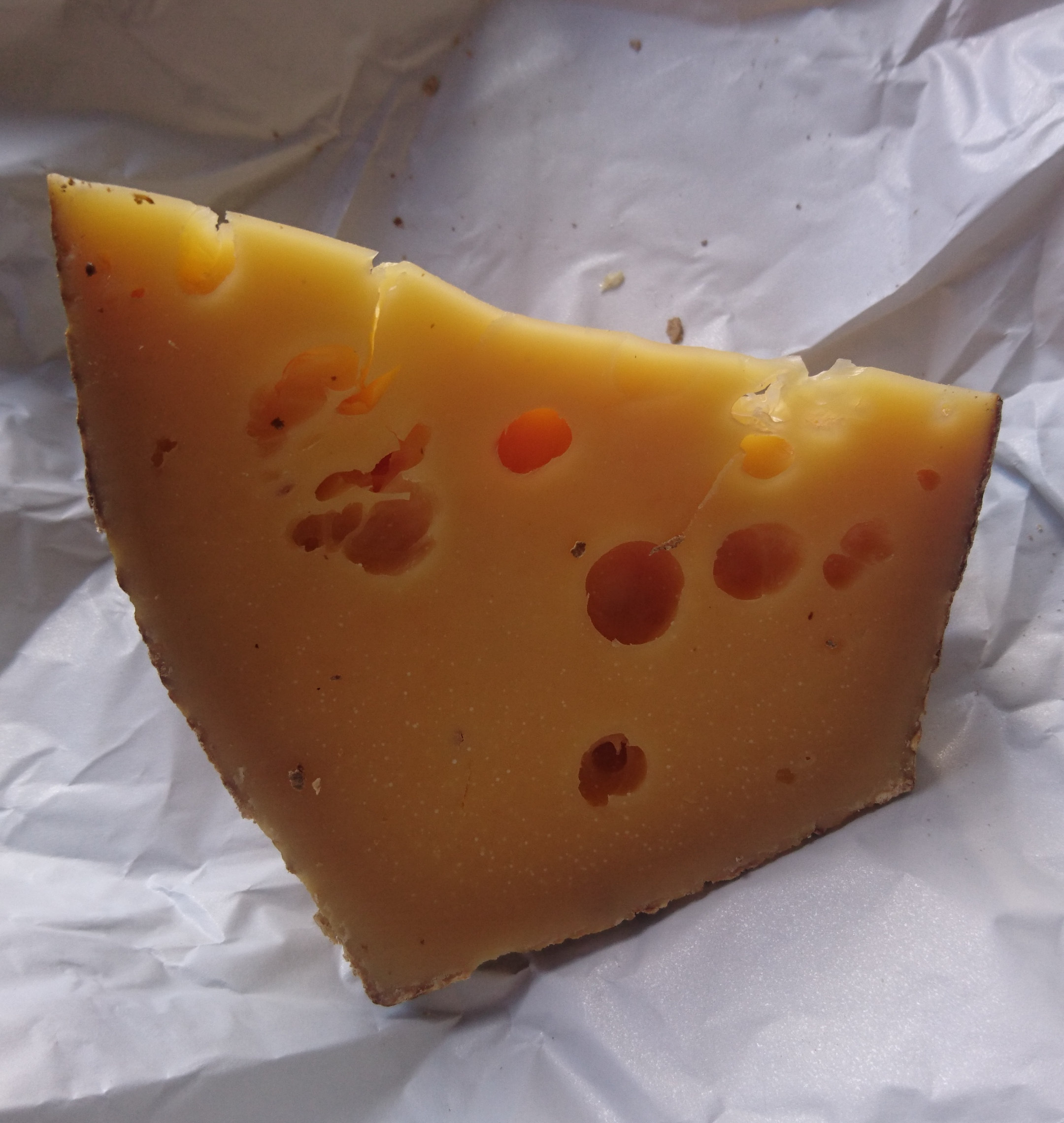 Avalin 1 an d'âge - août 2020